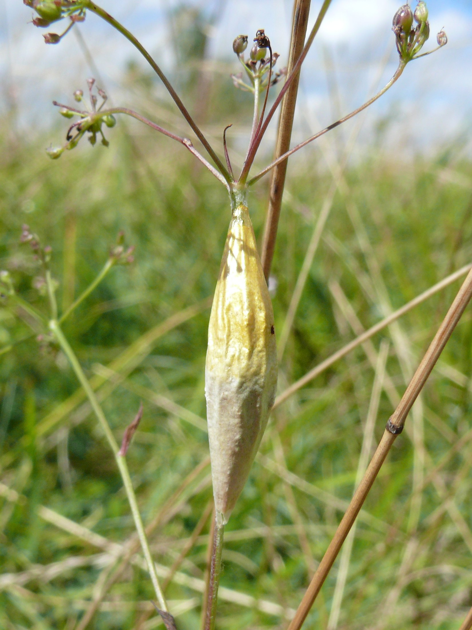 Zygaena filipendulae